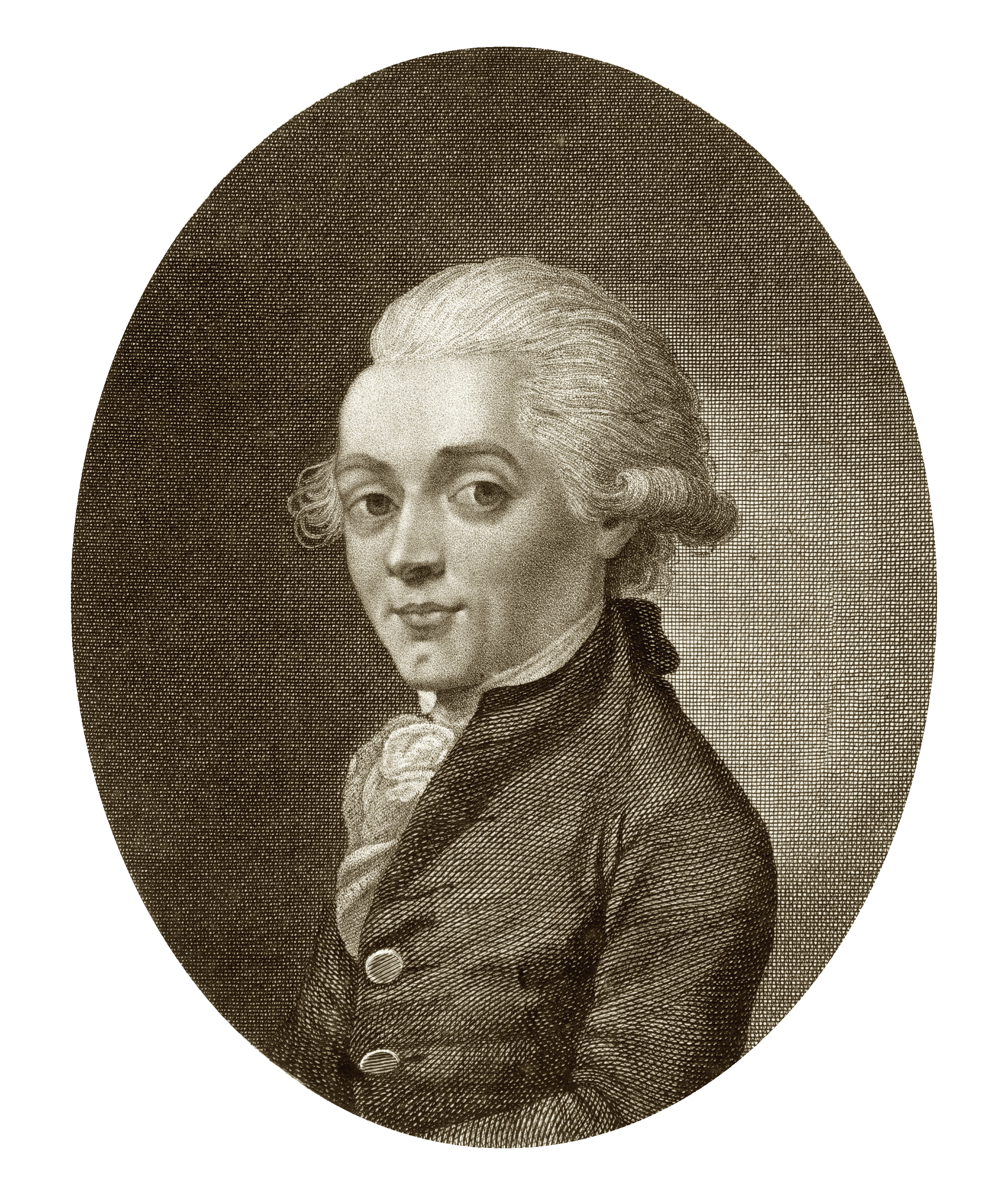 Jean-Pierre Blanchard (* 4. Juli 1753 in Les Andelys; † 7. März 1809 bei Paris) war ein französischer Ballonfahrer.